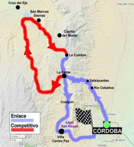 Dakar 2018. Mapa del circuito de la etapa 14. Córdoba-Córdoba.